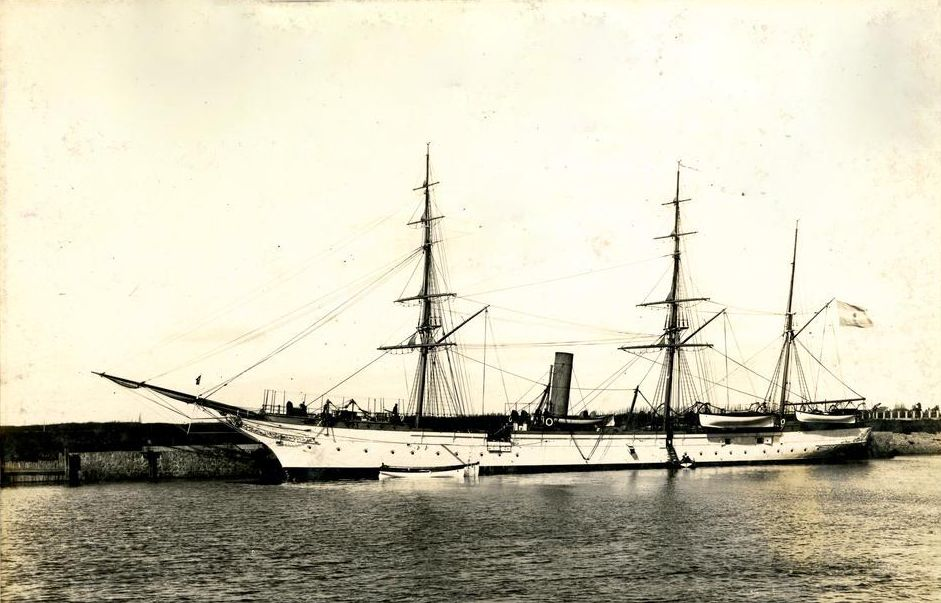 Buque escuela (corbeta) ARA La Argentina (1884)